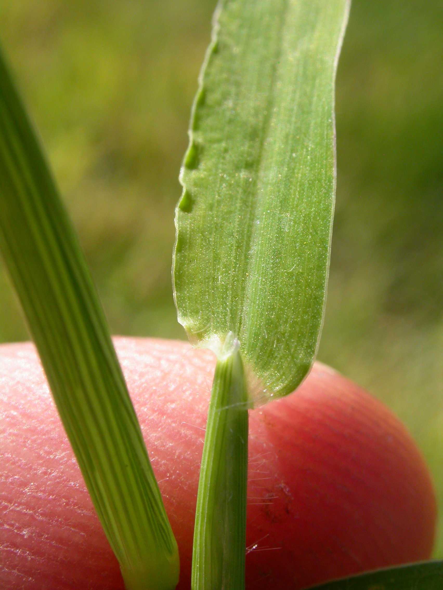 Digitaria has a membranous ligule.